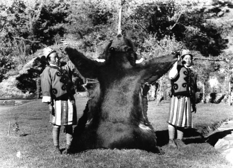 Tschumbital [Chumbital], kapitaler Kragenbär